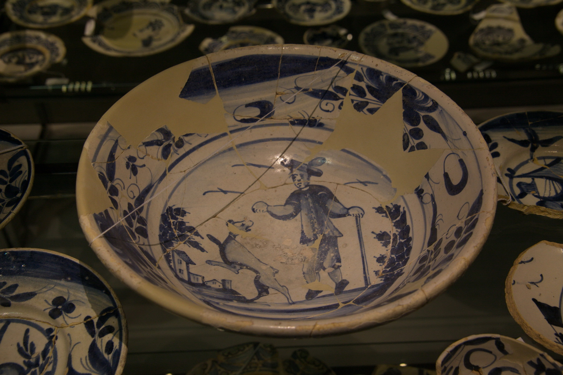 Jaciment arqueològic del Born (Barcelona, 1717). Ceràmica